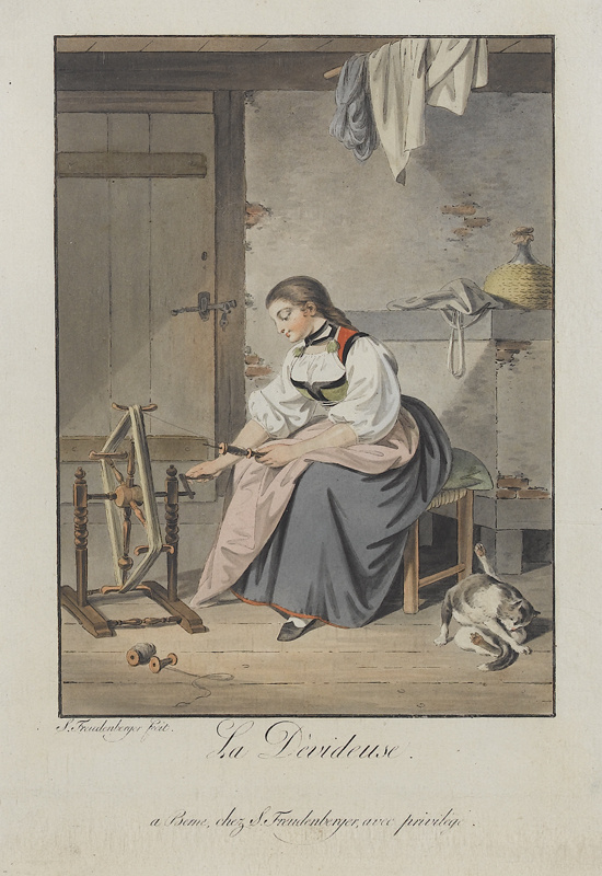 La Dévideuse. (Frau mit Haspel). Umrissradierung, koloriert, 26.6 x 18.3 cm